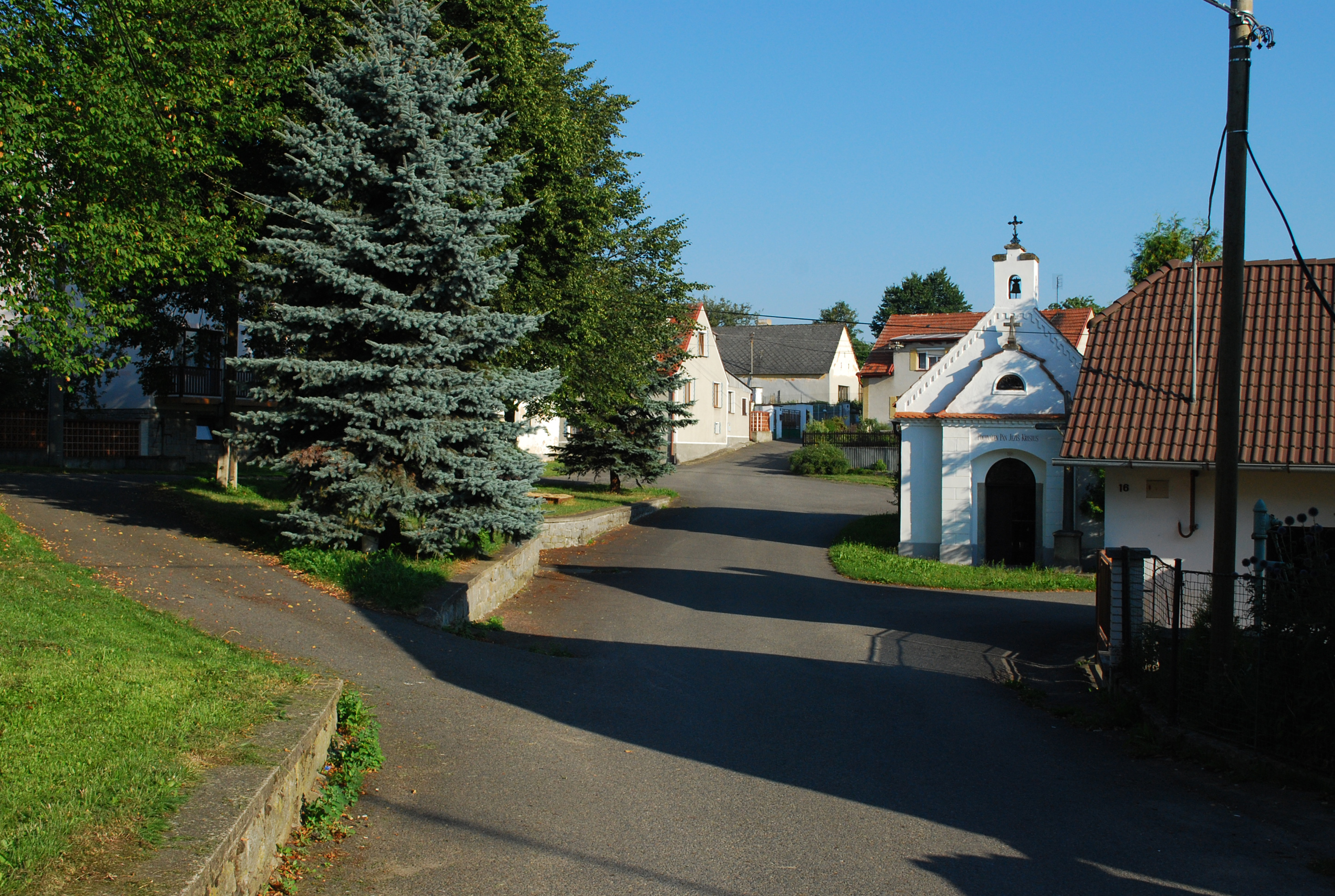 Obec Lažánky v okrese Strakonice, kraj Jihočeský.